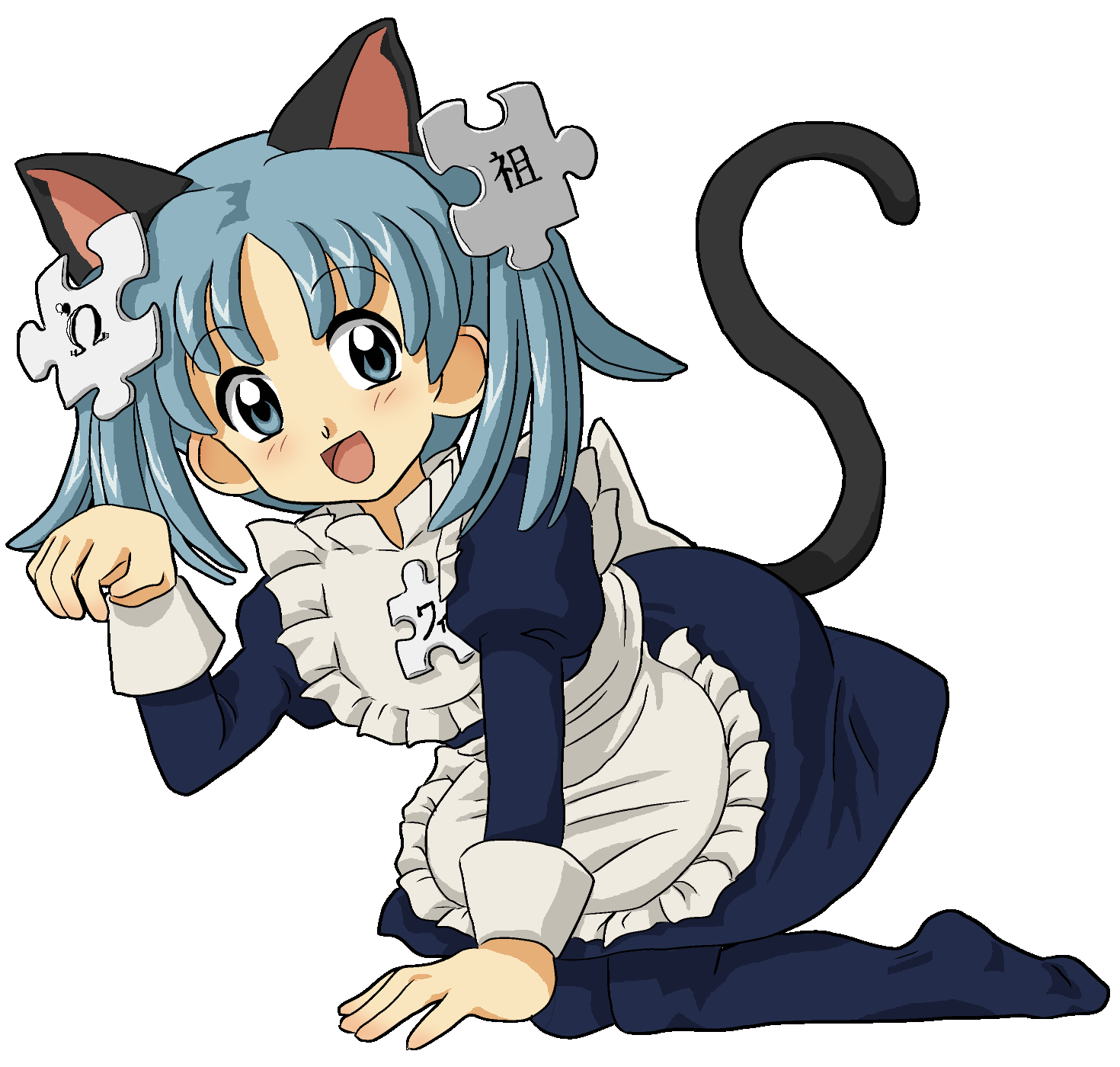 Wikipe-tan